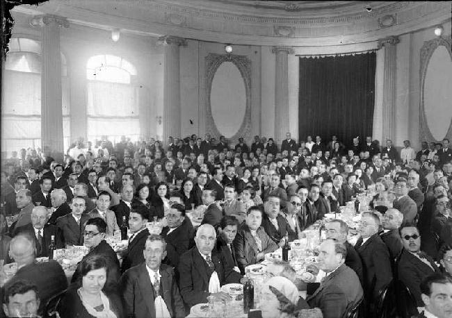 Banquet amb motiu d'un míting organitzat pel Cercle Tradicionalista. Restaurant del Parc, Barcelona.